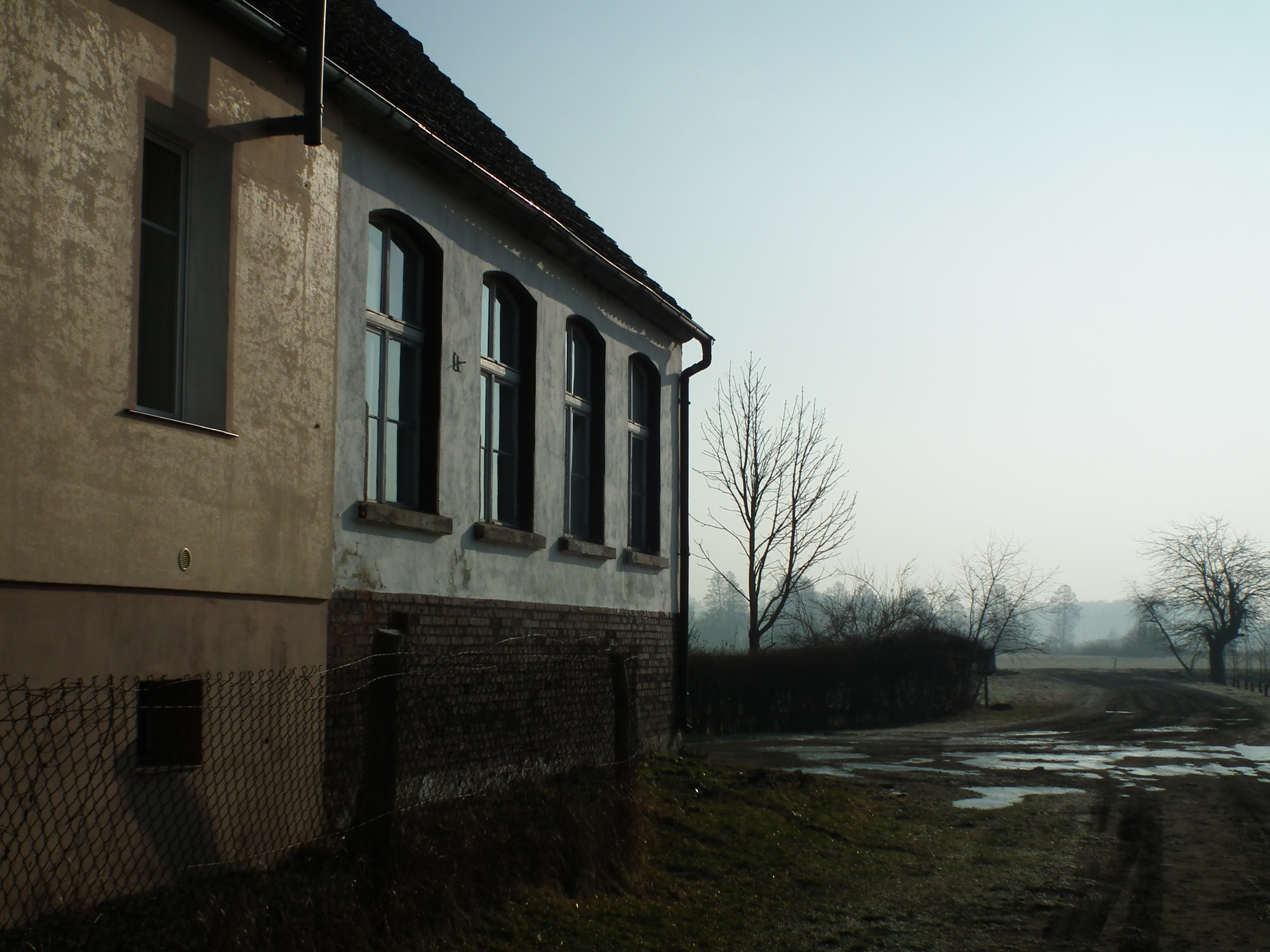 Stara szkoła w Głęboczku nad Notecią.